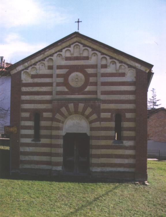 VGC. Calliano (AT) Chiesa romanica di San Pietro.